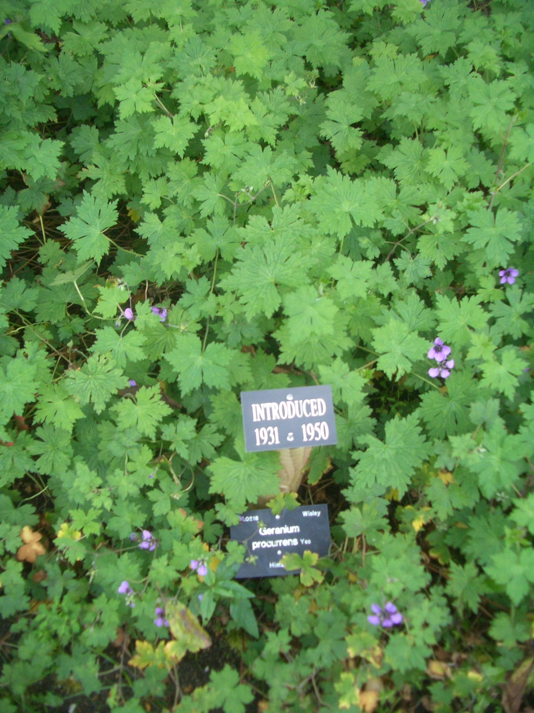 Chronological beds, Cambridge Botanical Garden